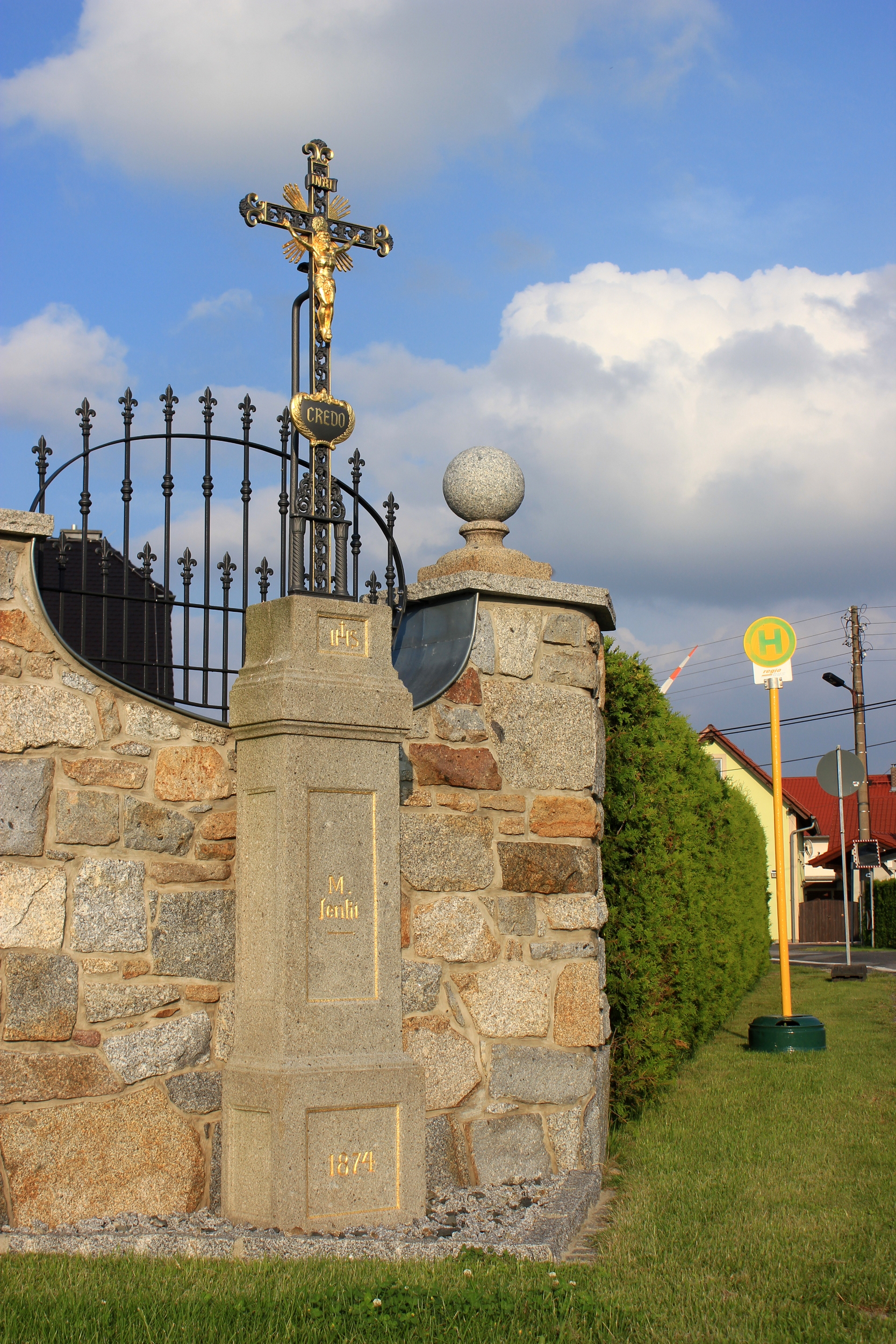 Hornjoserbsce: Swjaty křiž na Horje. Napismo: "Credo".